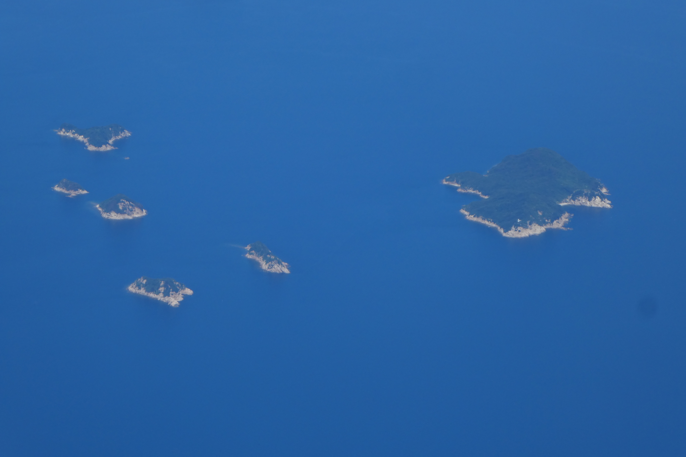 家島諸島南部の島嶼群。左から、桂島、小ツフラ島、大ツフラ島、三ッ頭島、長島、松島。